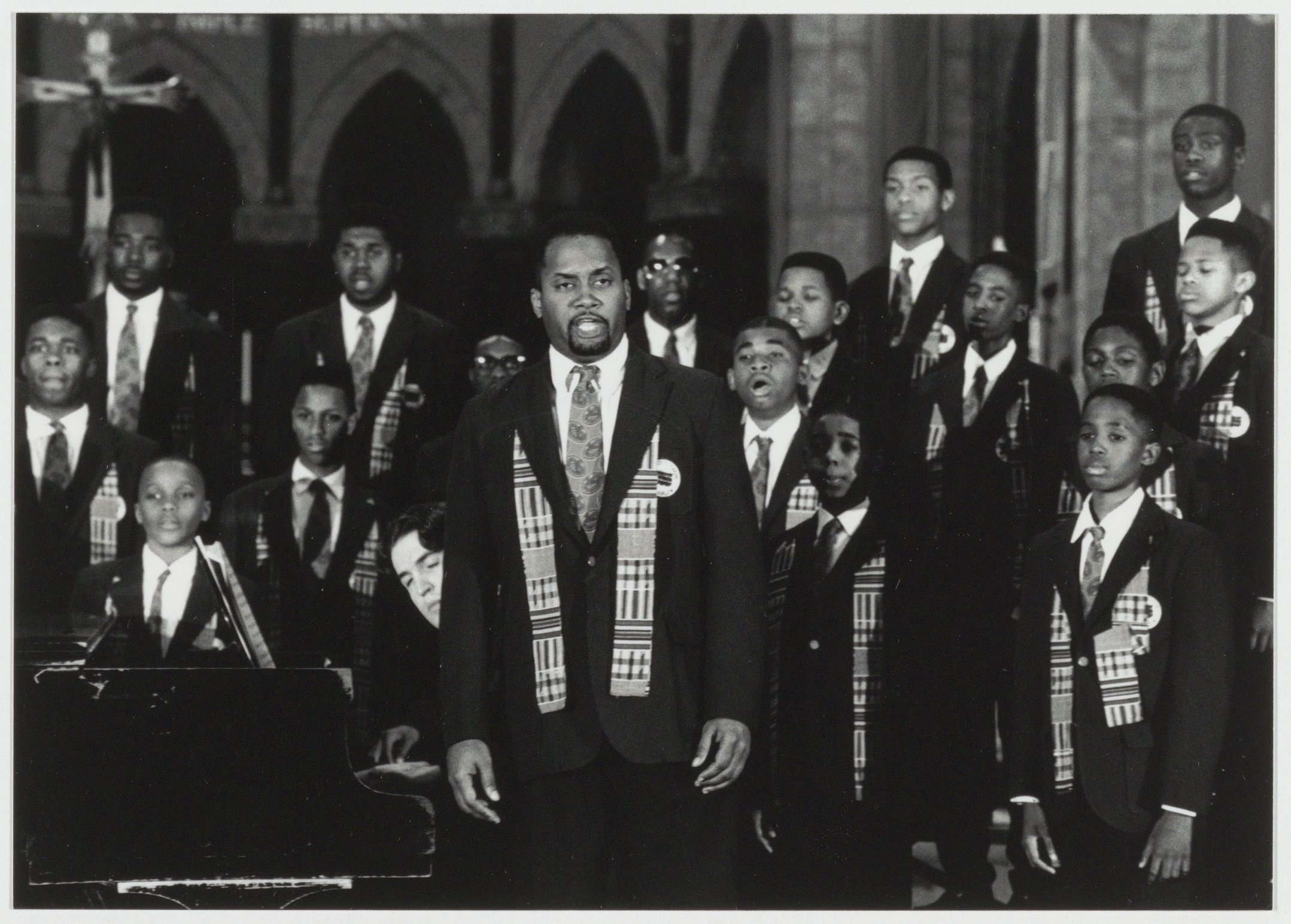 CollectieCollectie Fotoburo de BoerInventarisnummerNL-HlmNHA_54034146NL-HlmNHA_1478_36469kBeschrijvingHet Boys Choir of Harlem ( New York) zingt in de Kathedraal St. Bavo o.l.v. Walter Turnbull.FotonummerNL-HlmNHA_1478_3965DocumenttypeHistorieprenten, tekeningen en foto'sVervaardigerDaalen, Gerald van (UP de Boer) Soort vervaardigerFotograaf AnnotatiesHD 030692LandNederland ProvincieNoord-Holland GemeenteHaarlem PlaatsHaarlem StraatLeidsevaart Begindatum06-1992Einddatum06-1992TechniekFoto Trefwoordenkunst en cultuur, religie